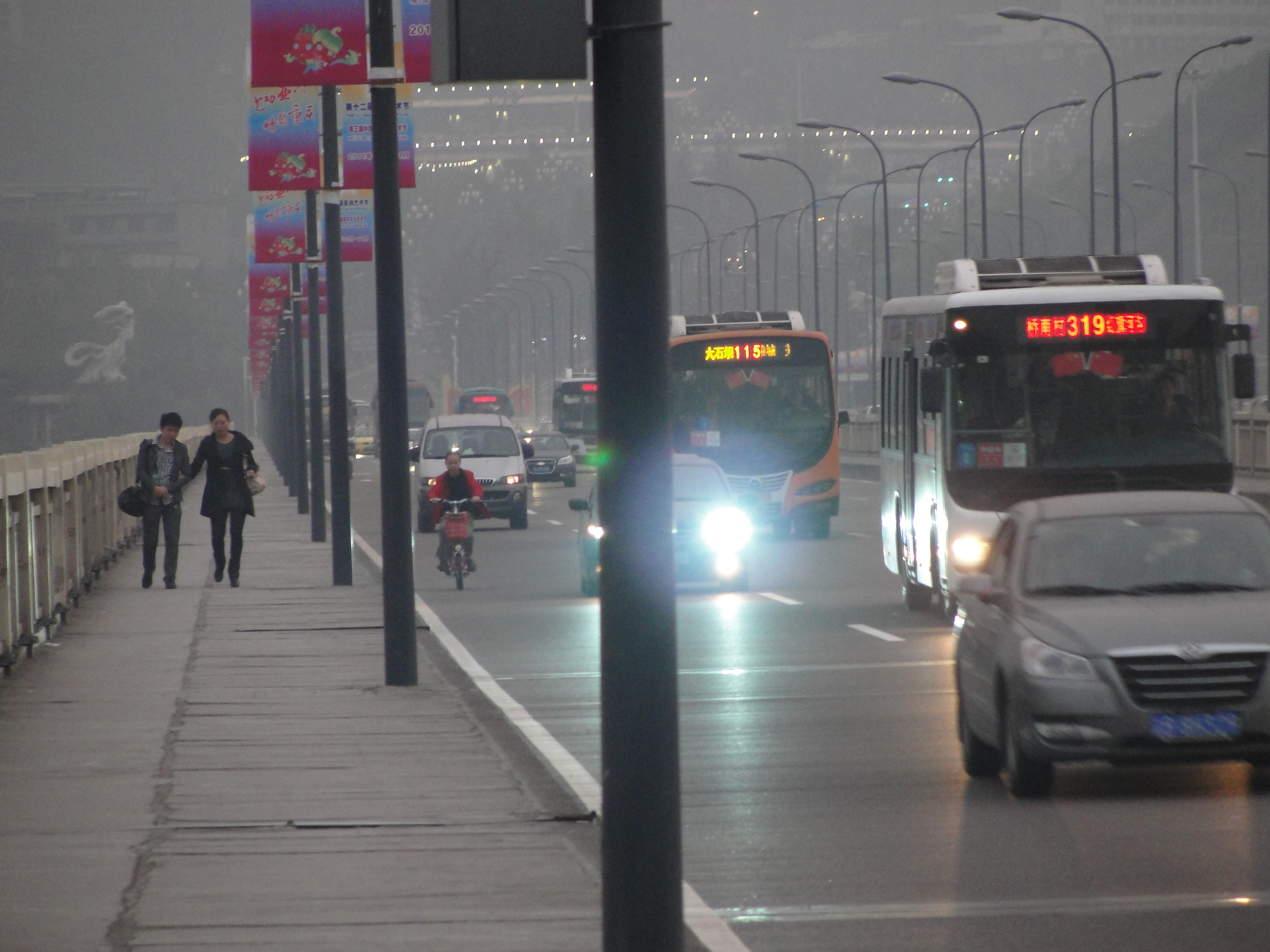 石板坡长江大桥作为进入渝中半岛以及沟通江北区的要道，交通非常繁忙